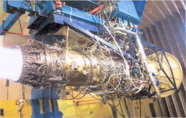 കാവേരി എഞ്ചിൻ പരീക്ഷണഘട്ടത്തിൽ